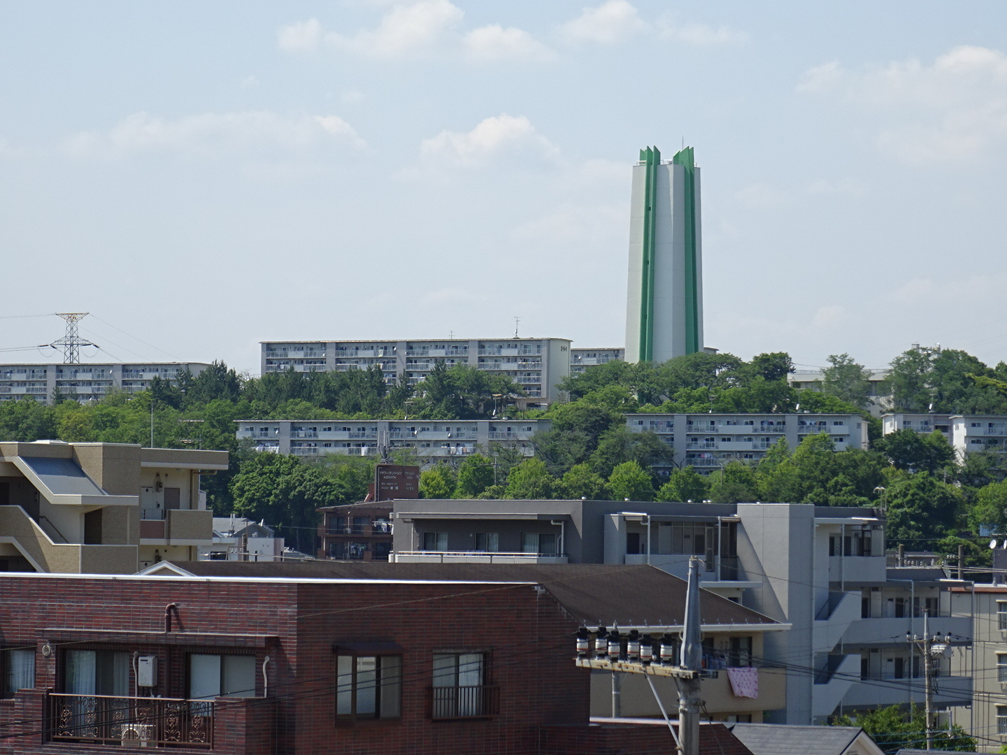 多摩ニュータウン愛宕二丁目住宅（15/06/24撮影）